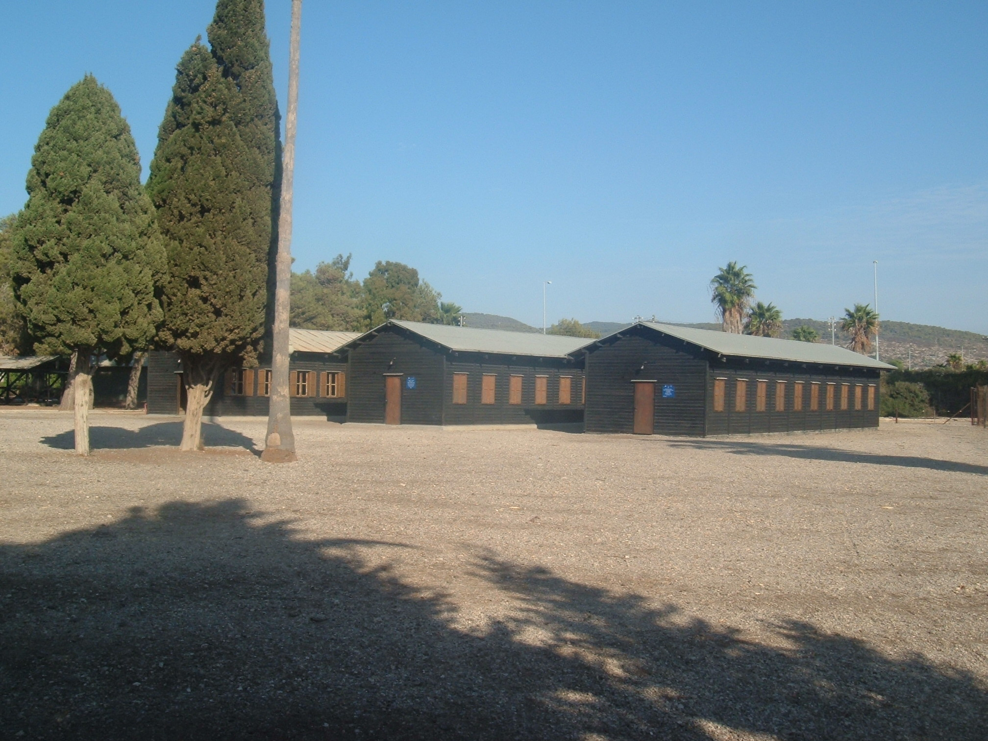 prisoners barracks in the former atlit detainee camp, israel. צריפי עצירים במחנה המעצר בעתלית, כיום אתר מחנה המעפילים על שם משה סנה, עתלית